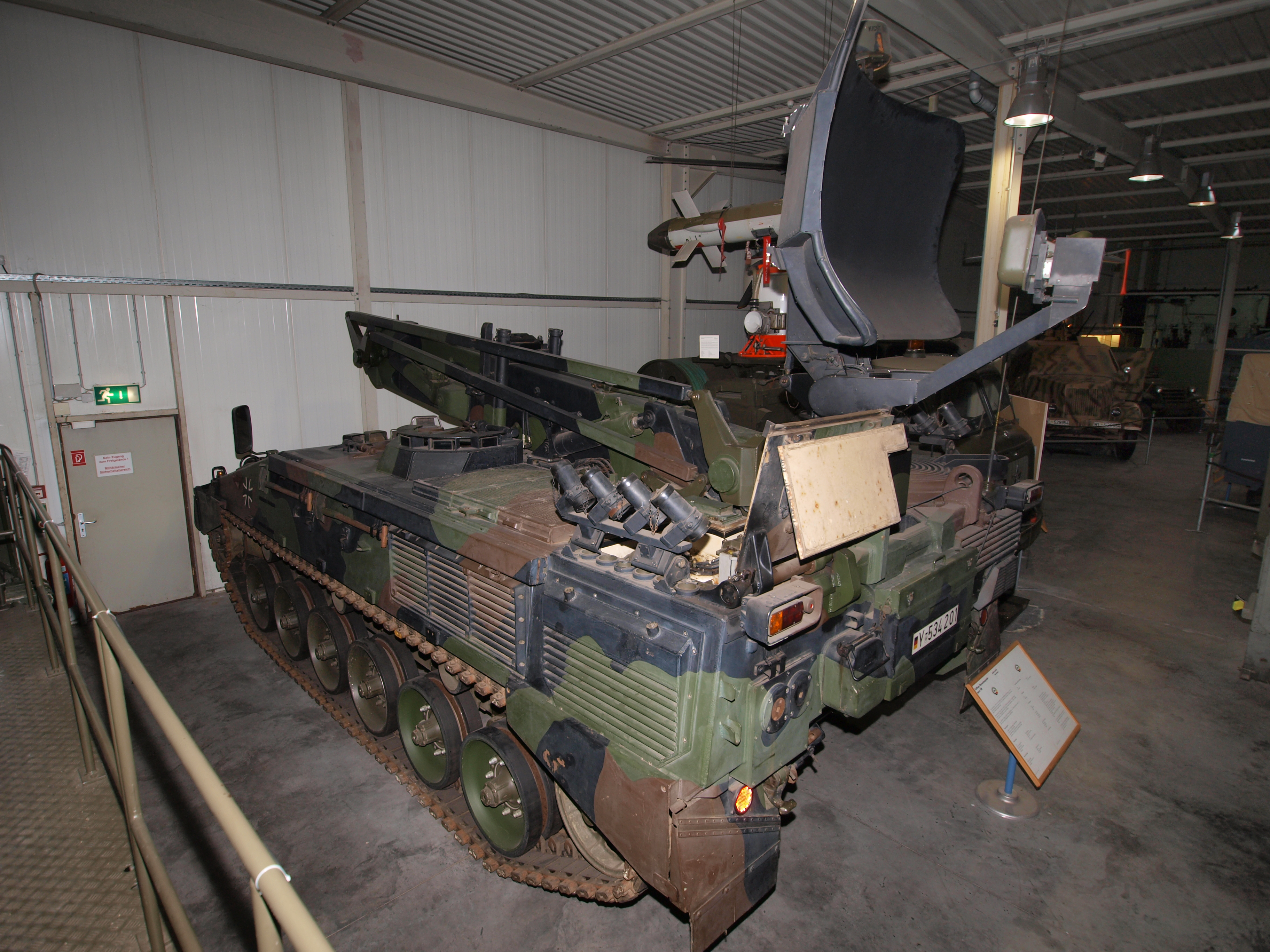 Marder 1 TÜR